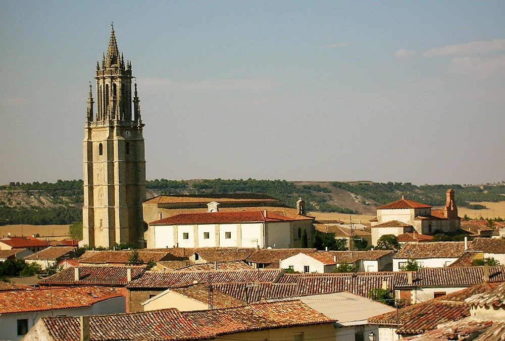 Ampudia (Palencia, España)